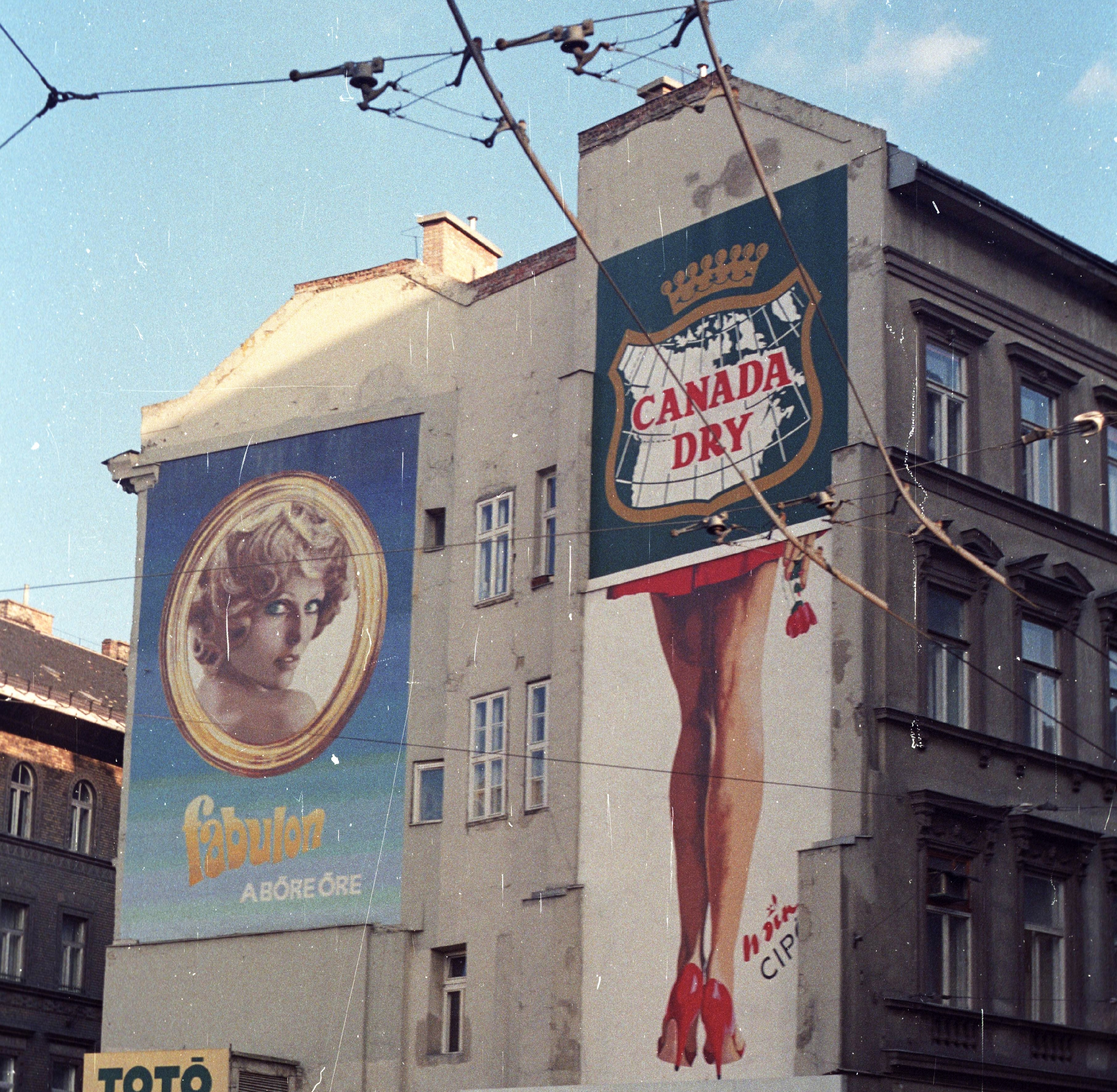 Kálvin tér, tűzfal az Üllői út és Baross utca között. Fabulon mozaikkép és Mino cipő reklám. Location: Hungary, Budapest VIII. Tags: ad, food;foodstuff, Budapest Title: Kálvin tér, tűzfal az Üllői út és Baross utca között. Fabulon mozaikkép és Mino cipő reklám.